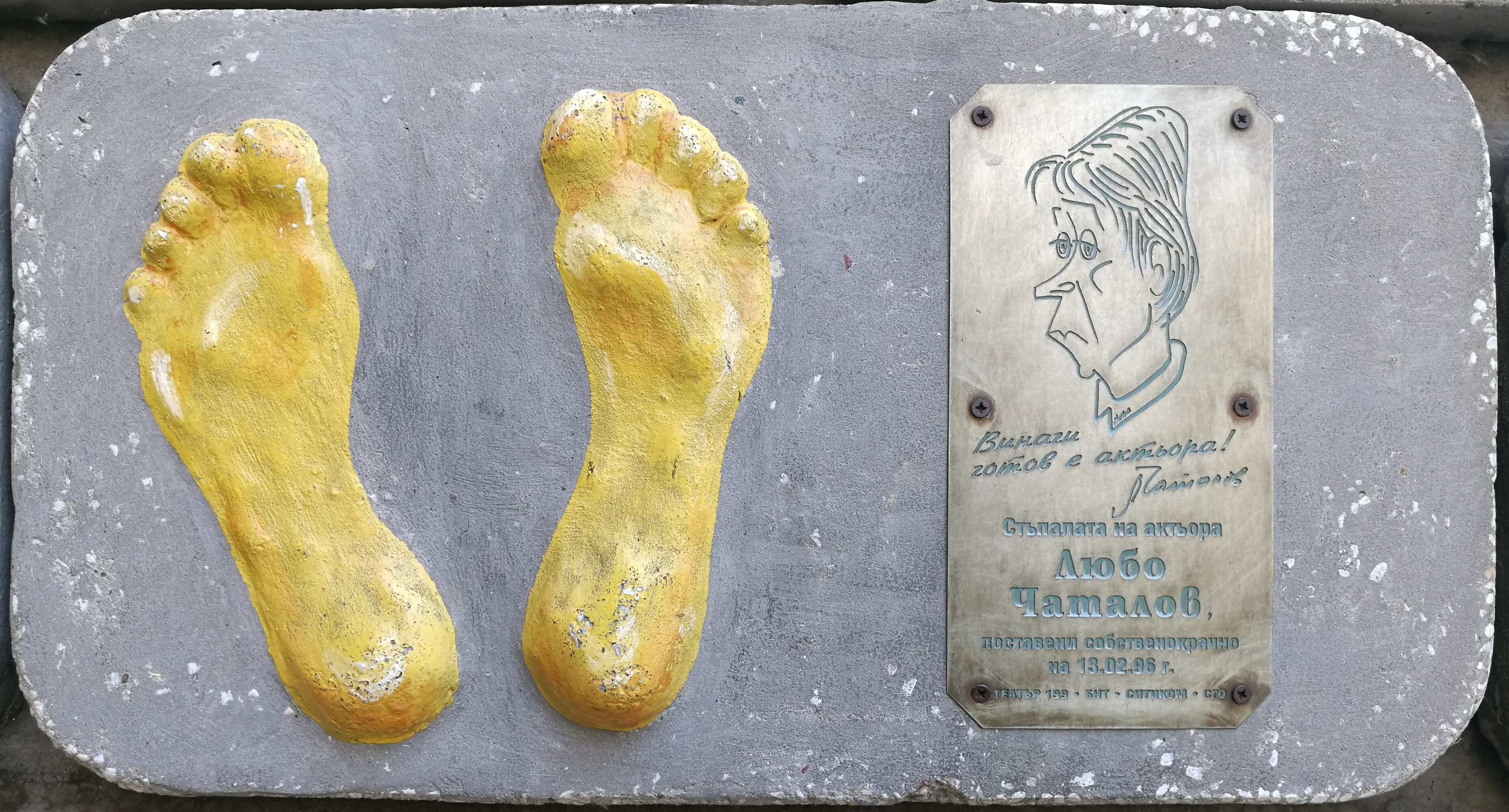 Стената на славата пред Театър 199 - пано с отпечатъци, послание и шарж на Любен Чаталов.